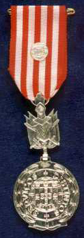 Medalha serviços distintos grau prata